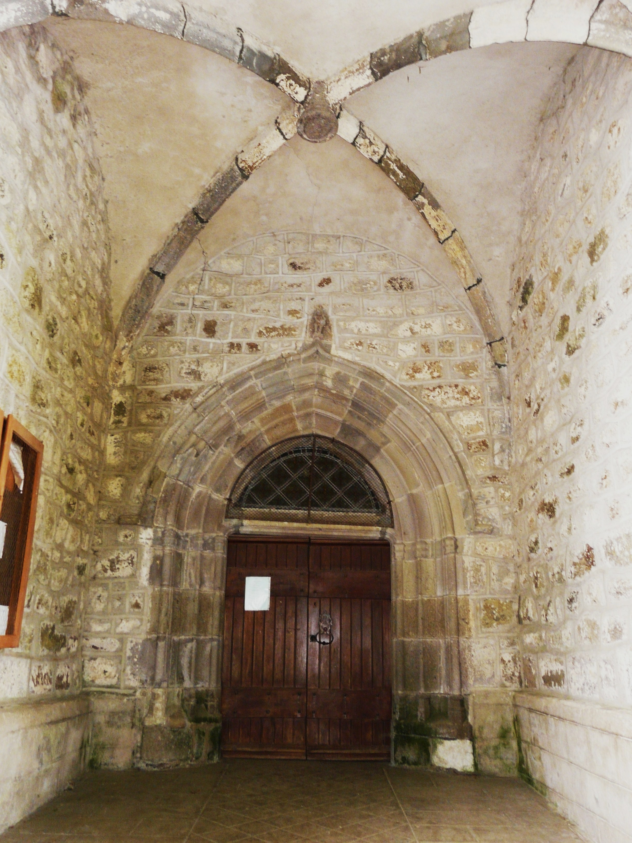 Le porche de l'église de Marchastel, Cantal, France.